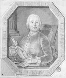 Retrato del compositor Francesco Corselli